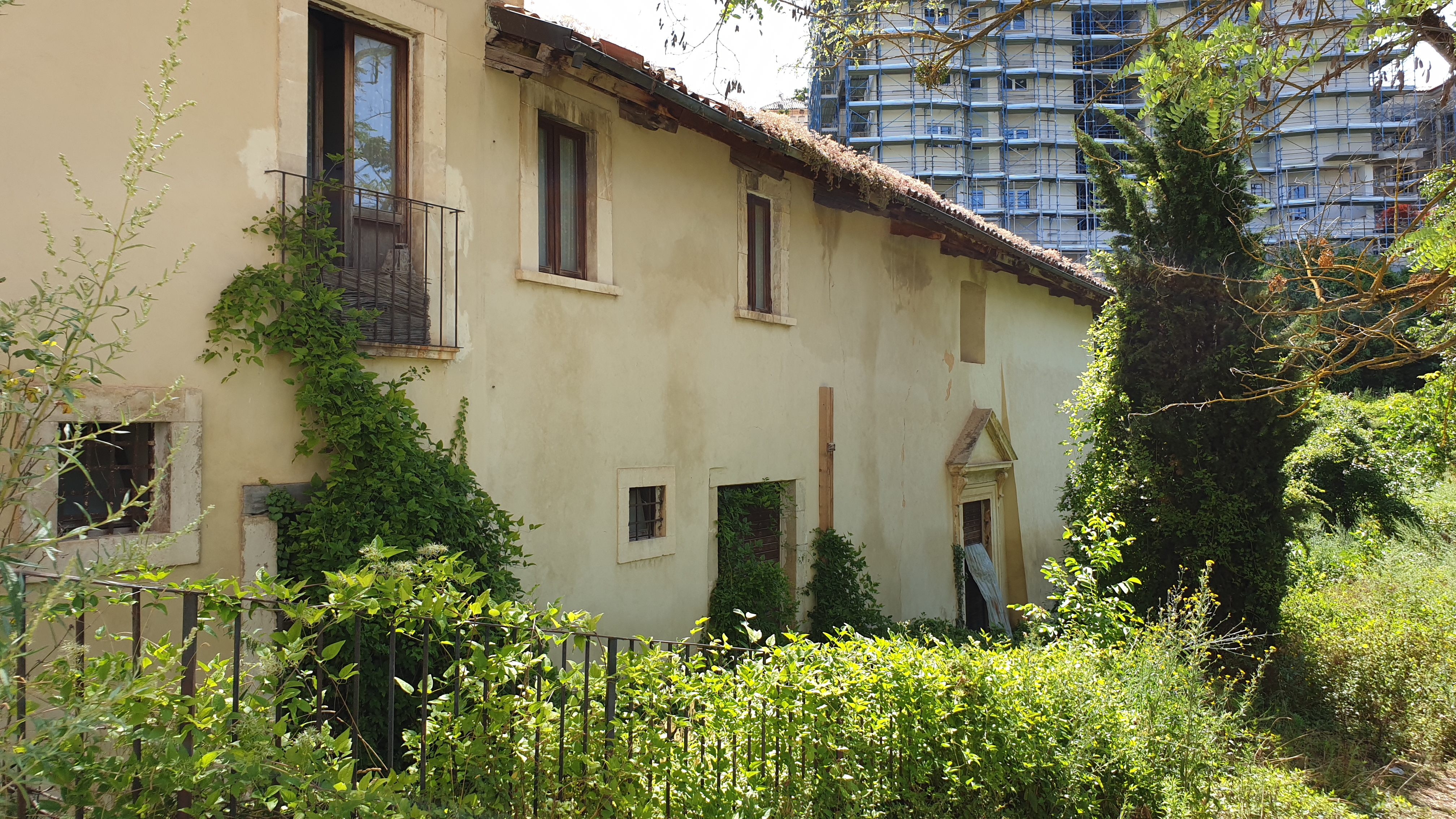 L'Aquila: Chiesa di Sant'Apollonia